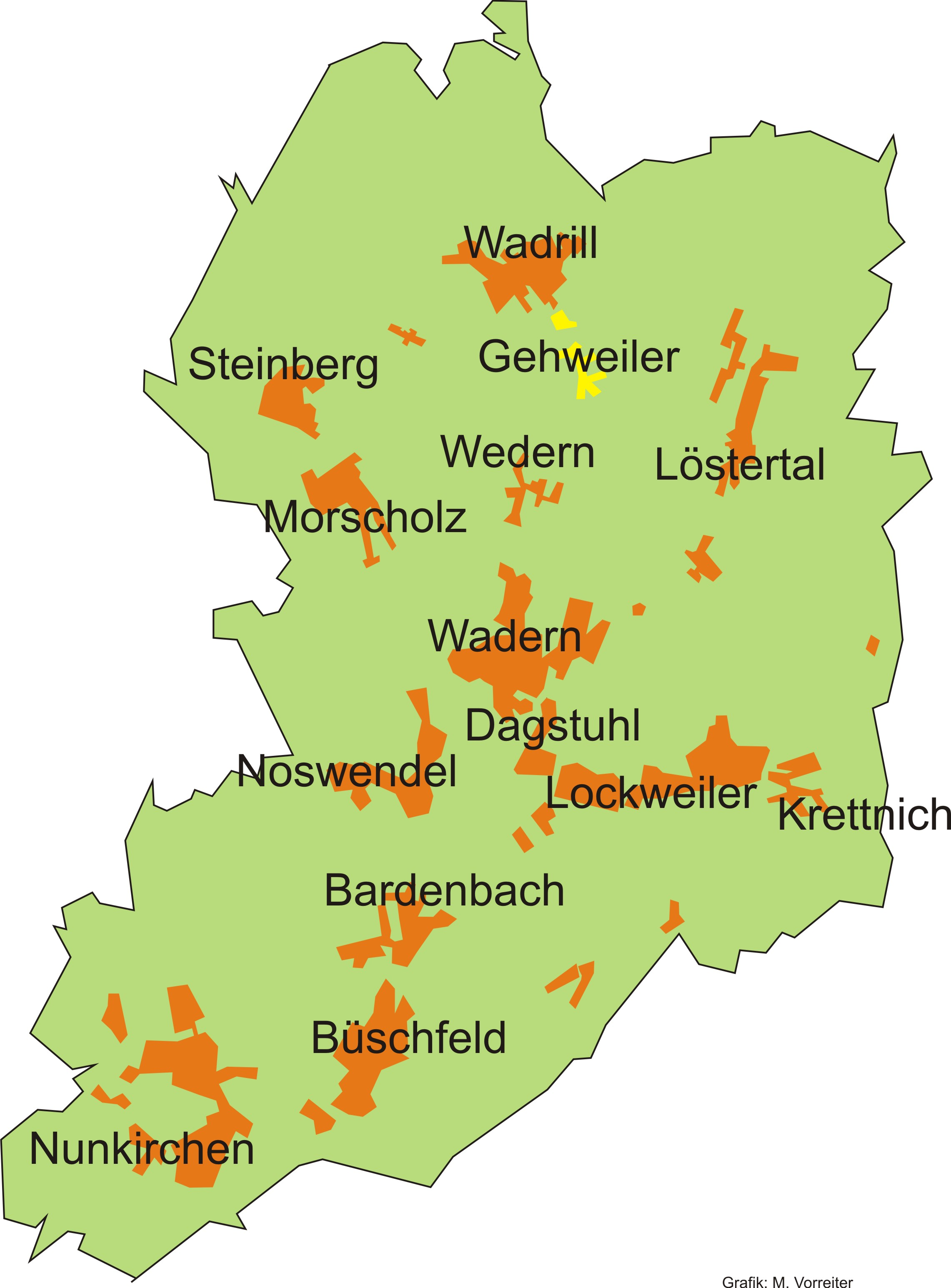 Lage des Stadtteils Gehweiler innerhalb der Stadt Wadern